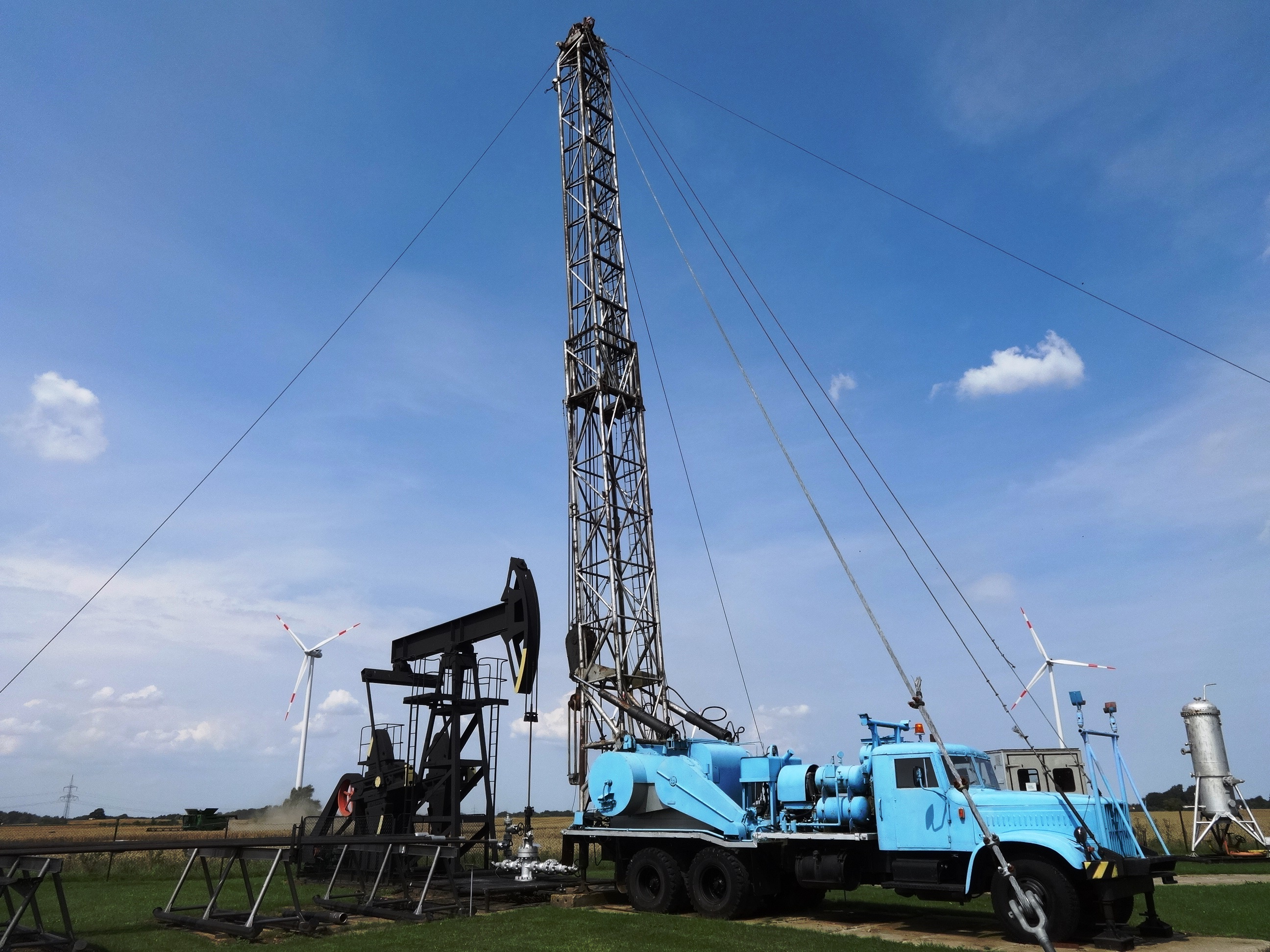 Erdölmuseum und Heimatstube in Reinkenhagen, Gemeinde Sundhagen in Mecklenburg-Vorpommern Der Raum um Grimmen und Reinkenhagen war von 1961 bis 1996 eines der größten norddeutschen Erdölfördergebiete auf dem Gebiet der DDR. Das Museum beschreibt die technischen Vorgänge, die Erdölförderung und ist am Standort der ersten erdölfündigen Bohrung Reinkenhagen 2/2a/60 eingerichtet. Eine Erdölstraße mit Exponaten führt von Miltzow aus zum Mueseum.